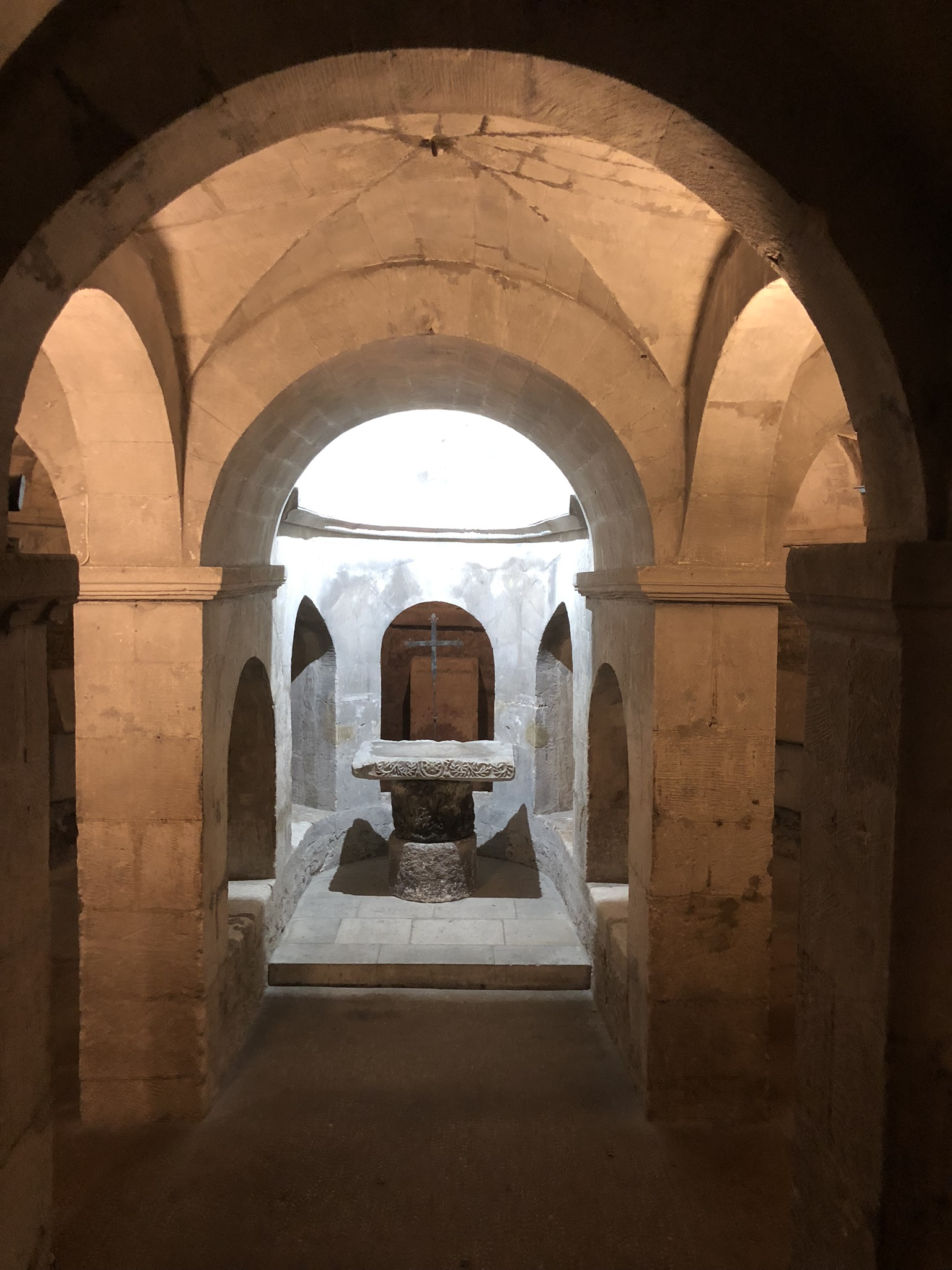 Obere Krypta der ehemaligen Kathedrale in Apt, Provence-Alpes-Côte, Frankreich